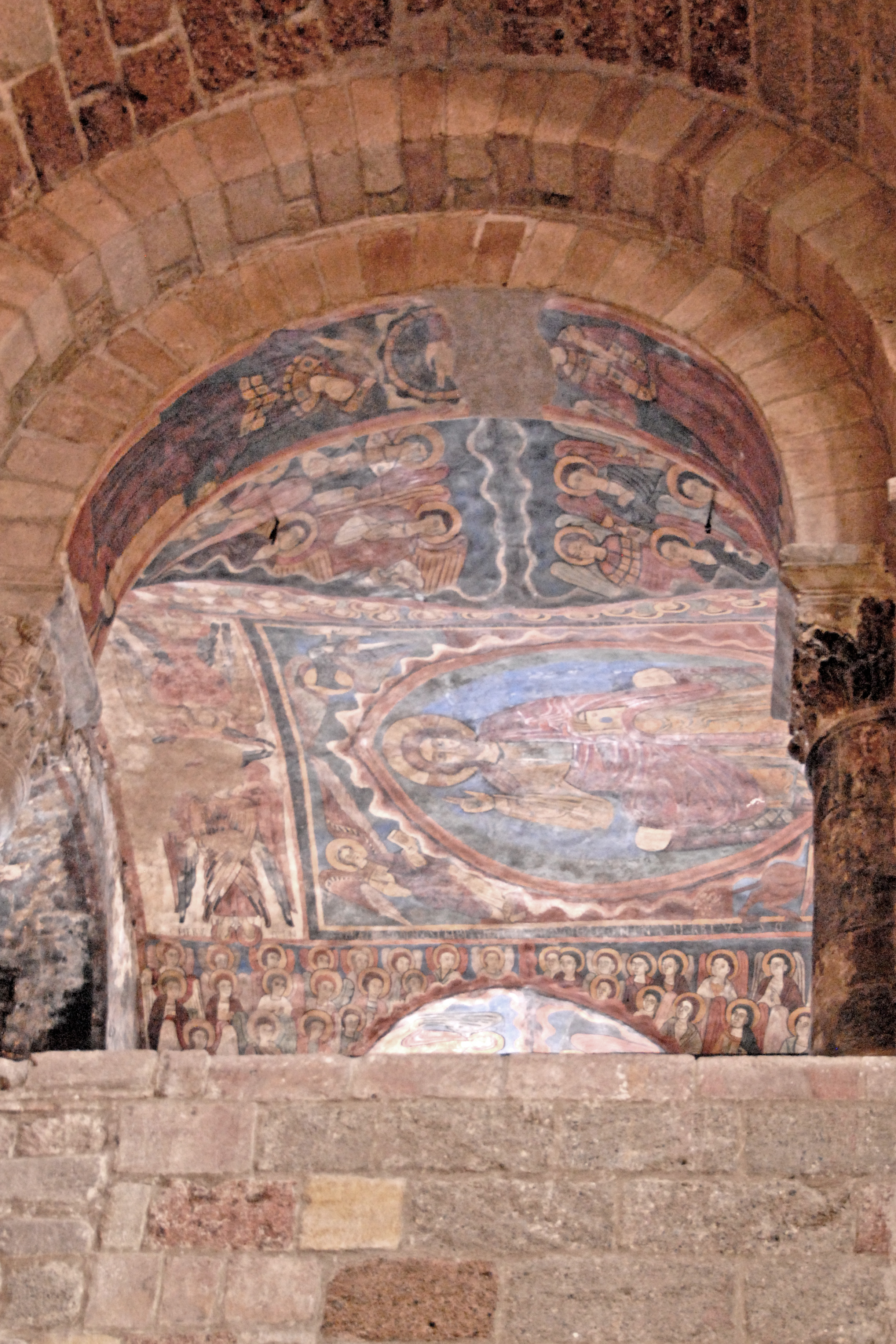 Saint-Julien Brioude, Michaelskapelle aus SO-Seitenschiff